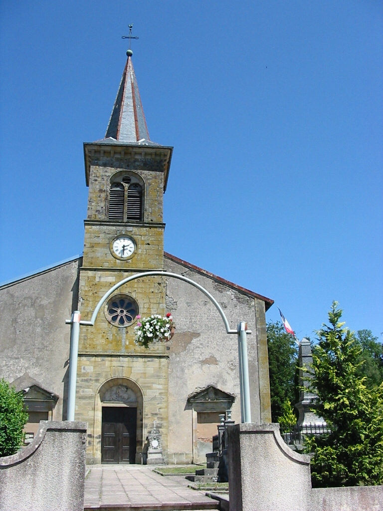 Aydoilles Église Saint-Georges Commune du canton de Bruyères (Vosges) Photo personnelle du 10 juillet 2006. Copyright © Christian Amet